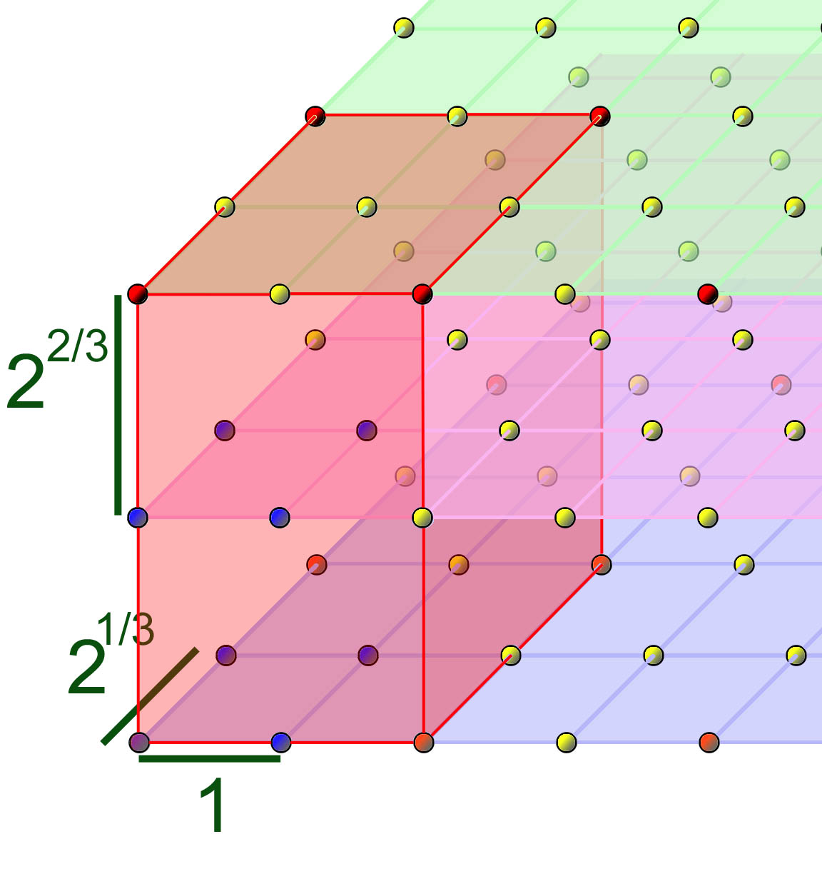 Illustration de la représentation de l'anneau des entiers Z[21/3] dans un réseau pour le calcul du discriminant et de la norme de l'idéal.